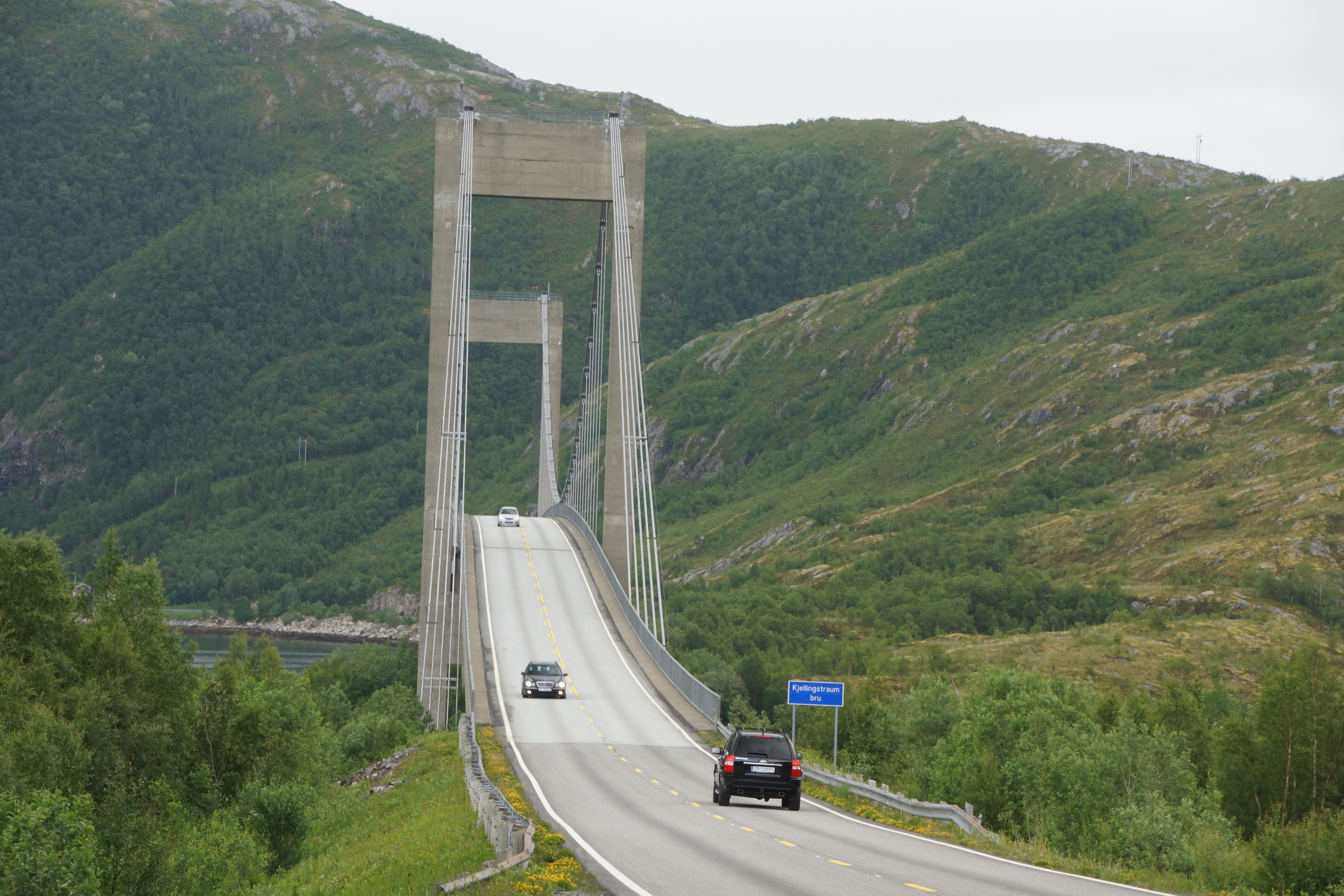 noorwegen 093